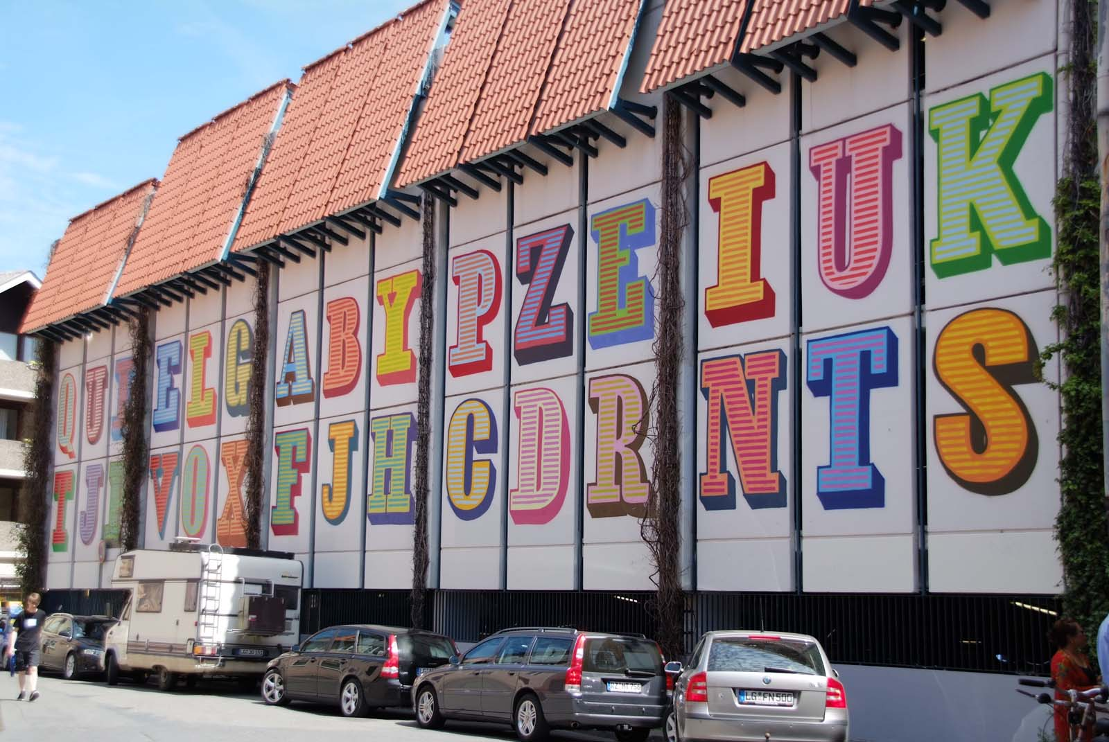 Kunstwerk von Ben Eine (im Rahmen der ARTotale entstanden) am Parkhaus Karstadt in Lüneburg, Auf dem Wüstenort